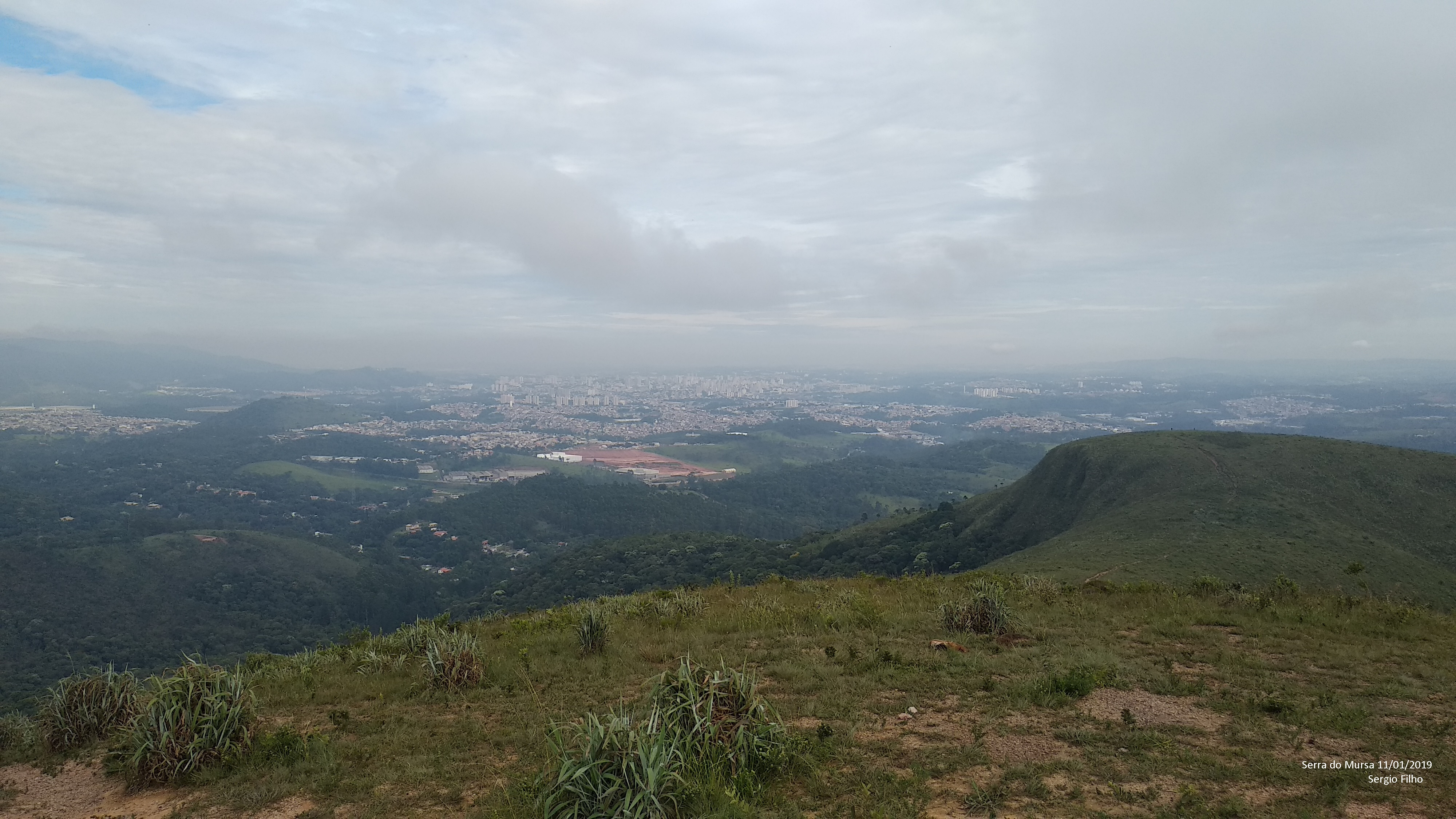 Vista serra do Mursa. É possível visualizar as seguintes cidades: Várzea Paulista, Jundiaí, Campo Limpo Pta, Jarinu, Itatiba.